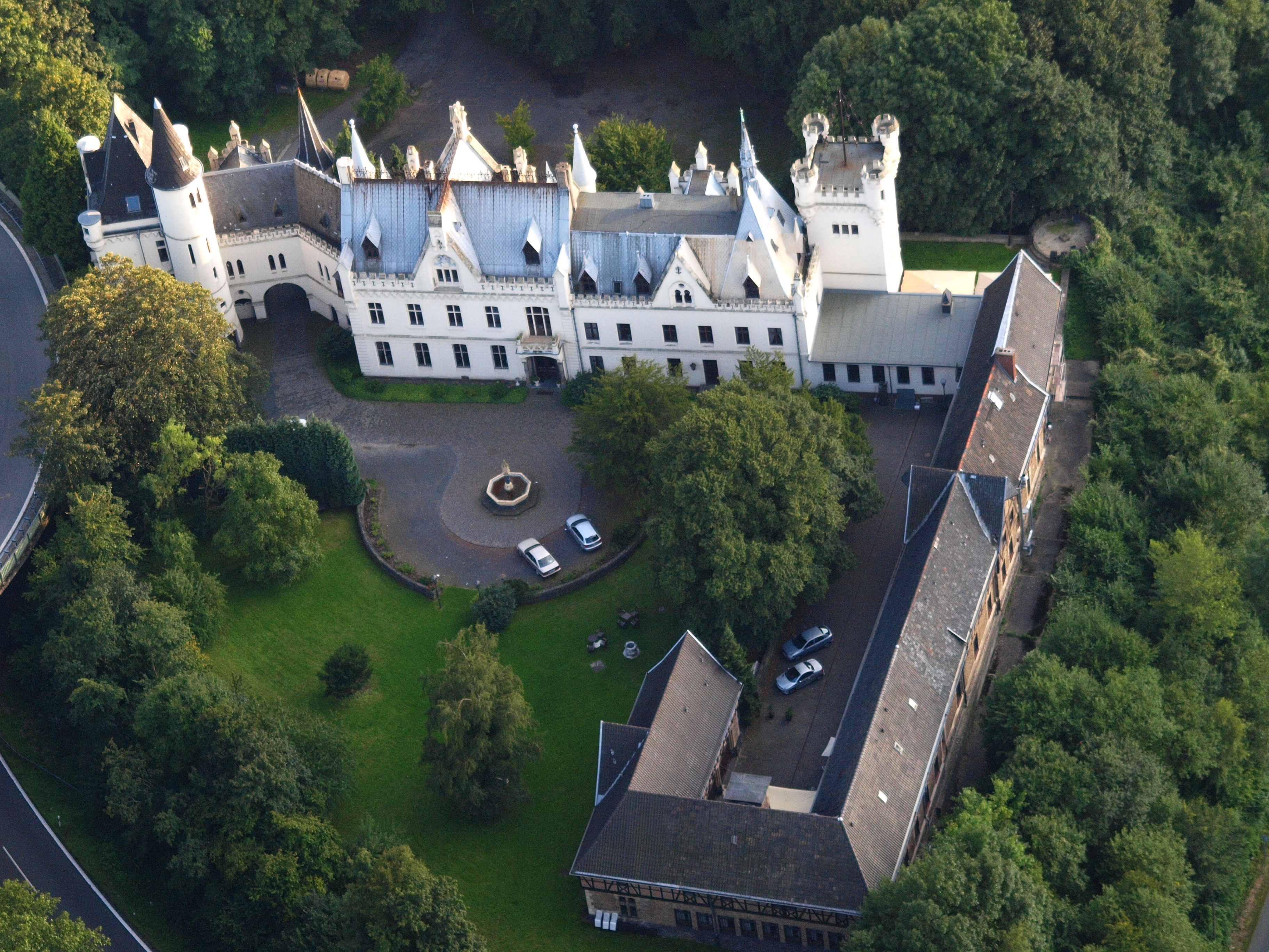 Kommende Ramersdorf, Beuel: Luftaufnahme